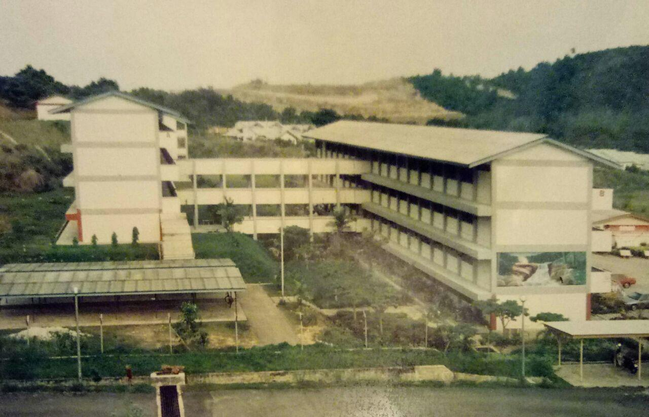 Bangunan Sekolah lama